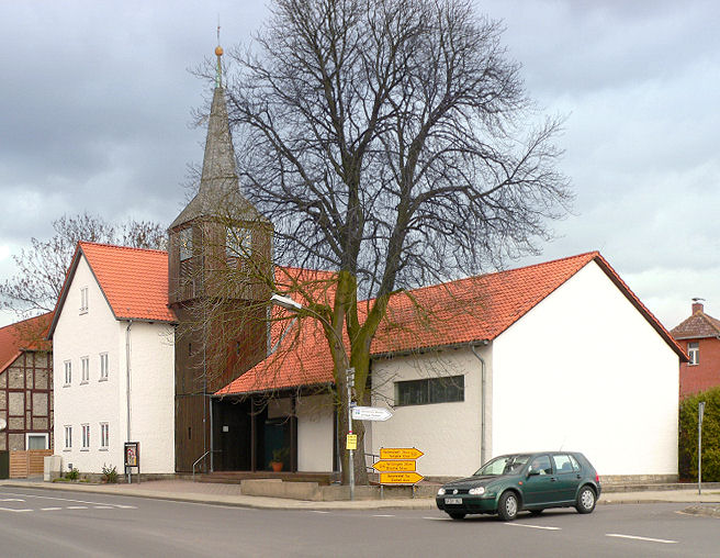 Evangelische Kirche Rühen